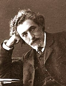 Российский писатель и общественный деятель Семён Акимович Ан-ский (Раппопорт) (1863-1920)